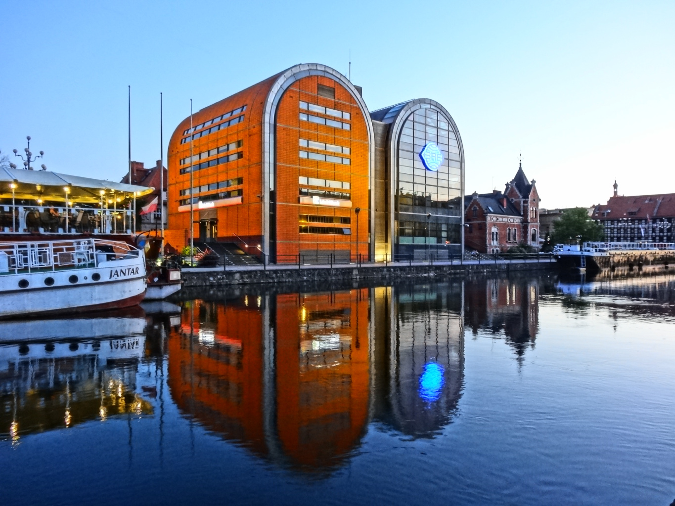 Zespół budynków BRE Banku w Bydgoszczy przy ulicy Grodzkiej, zwanych "szklanymi spichrzami", zbud. w 1998 r.